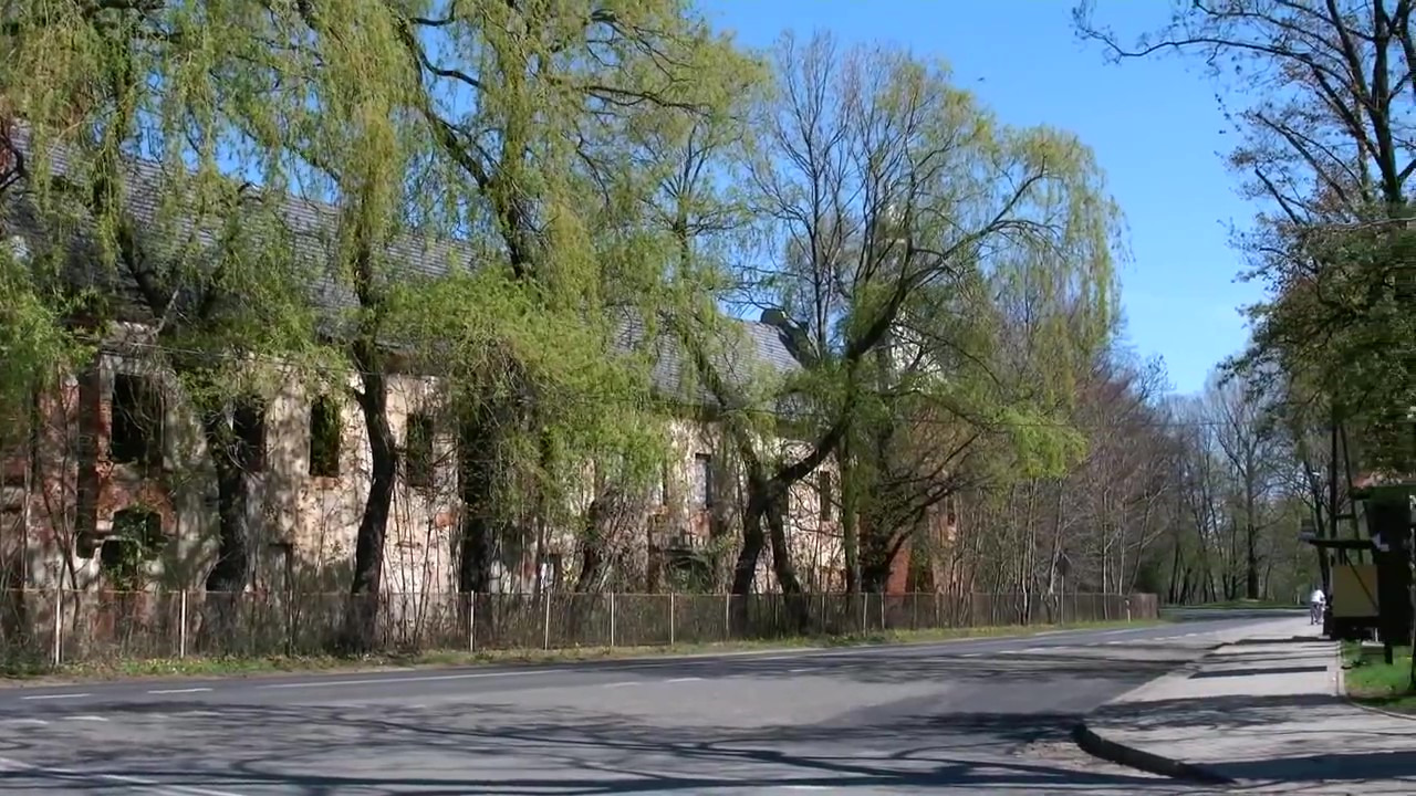 Zamek w Łące Prudnickiej widziany od strony drogi w kierunku Prudnika. Od pewnego czasu w rękach prywatnych i ulegający kompletnej ruinie. Niedaleko tego miejsca znajduje się rzeźba świętego Jana Nepomucena, Sam zamek nieco zniszczony w czasie wojny, a kompletna dewastacja nastąpiła w ostatnim dwudziestoleciu.